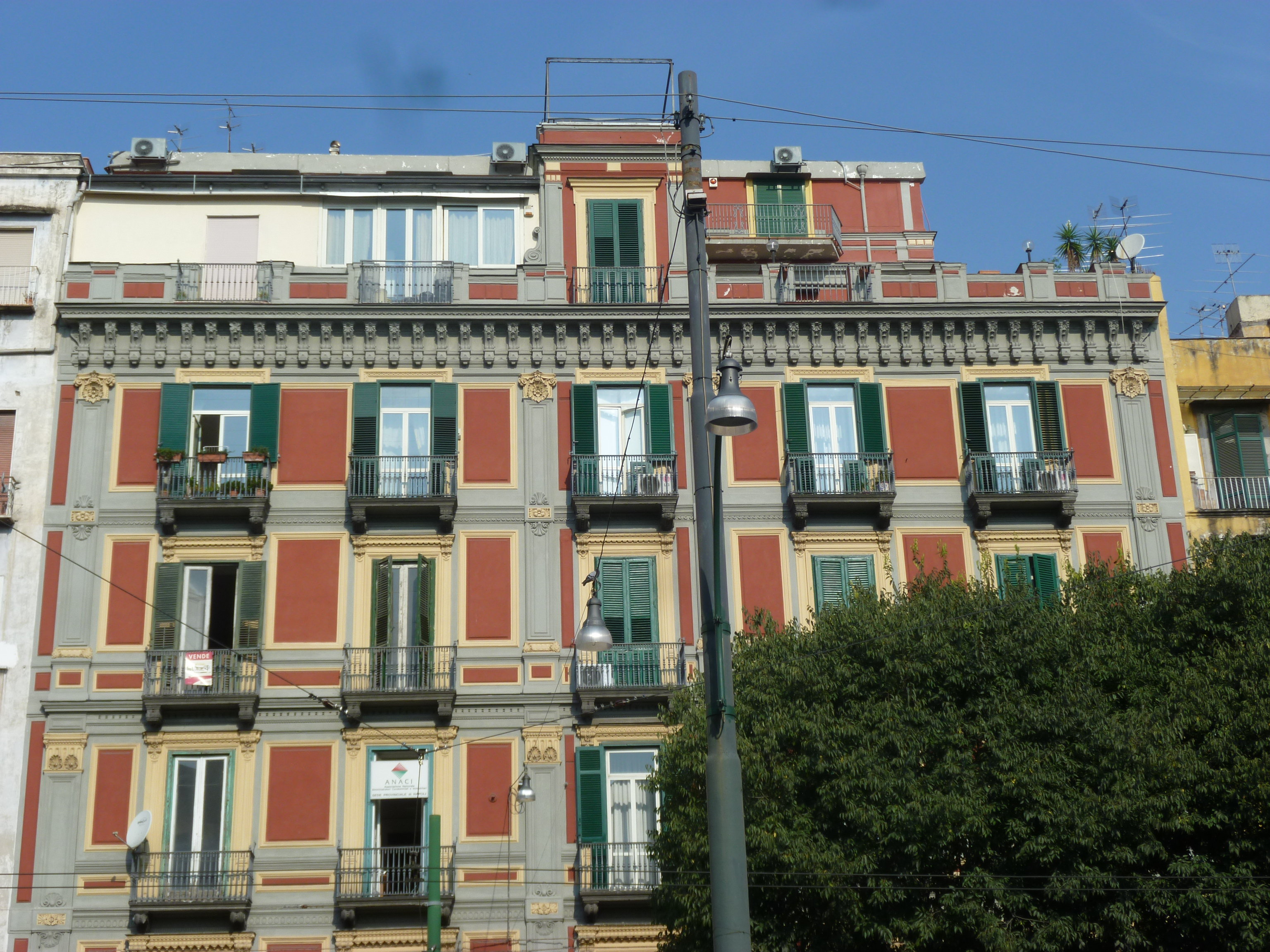 Napoli